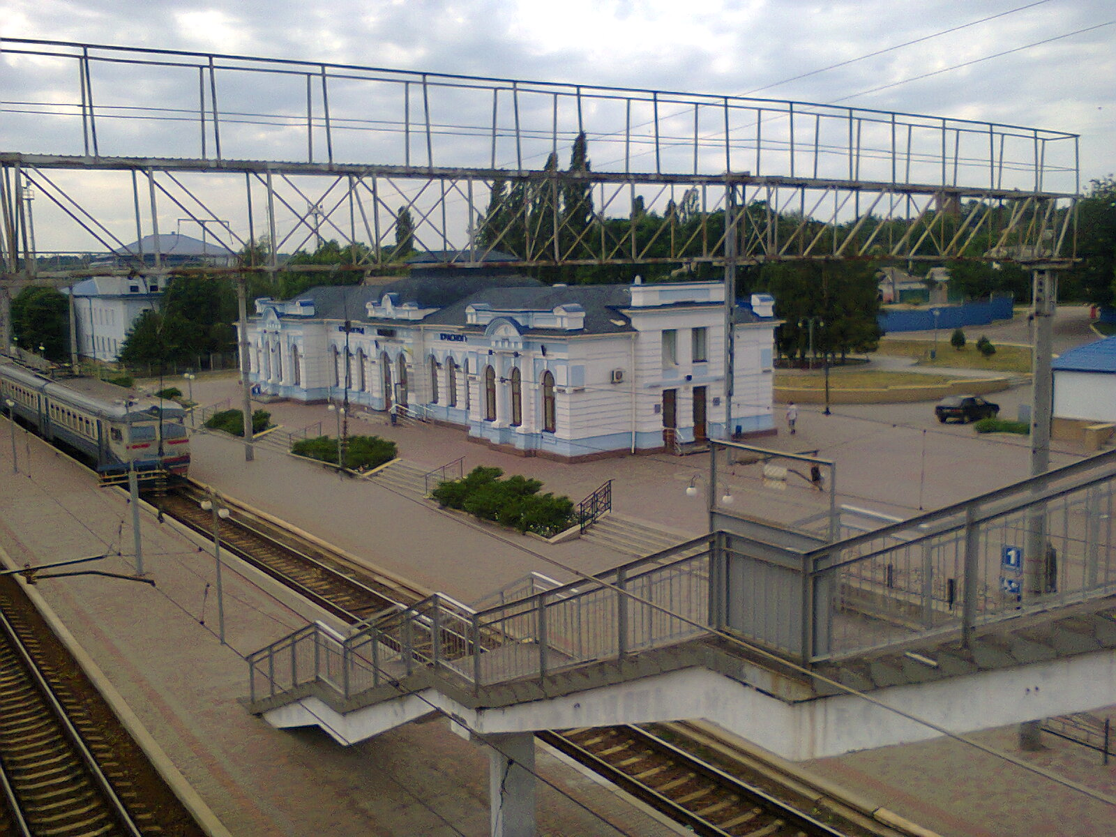 Загальний вигляд станції Красноград, літо 2017